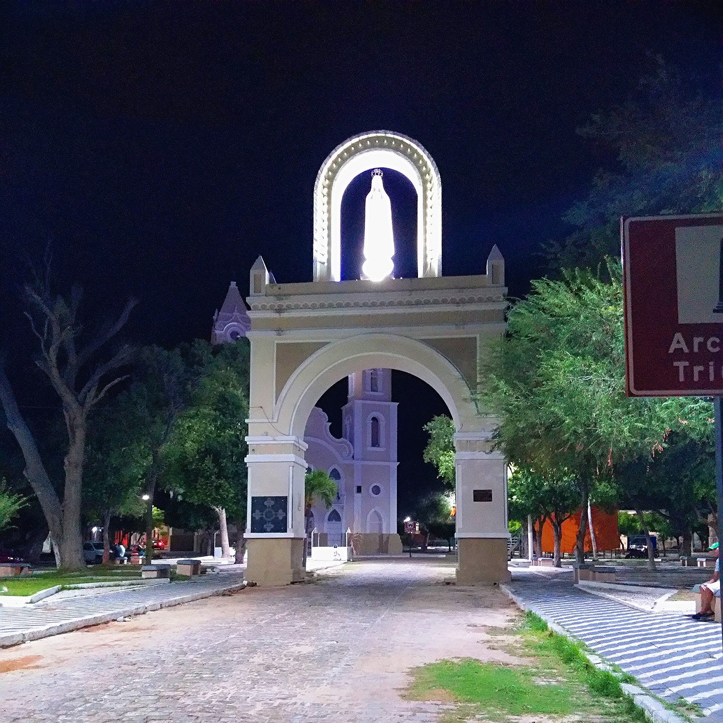 O Arco do Triunfo, trata-se de um monumento em formato de arco, localizado na praça da Matriz de Caicó, bem de frente à Catedral de Santana.